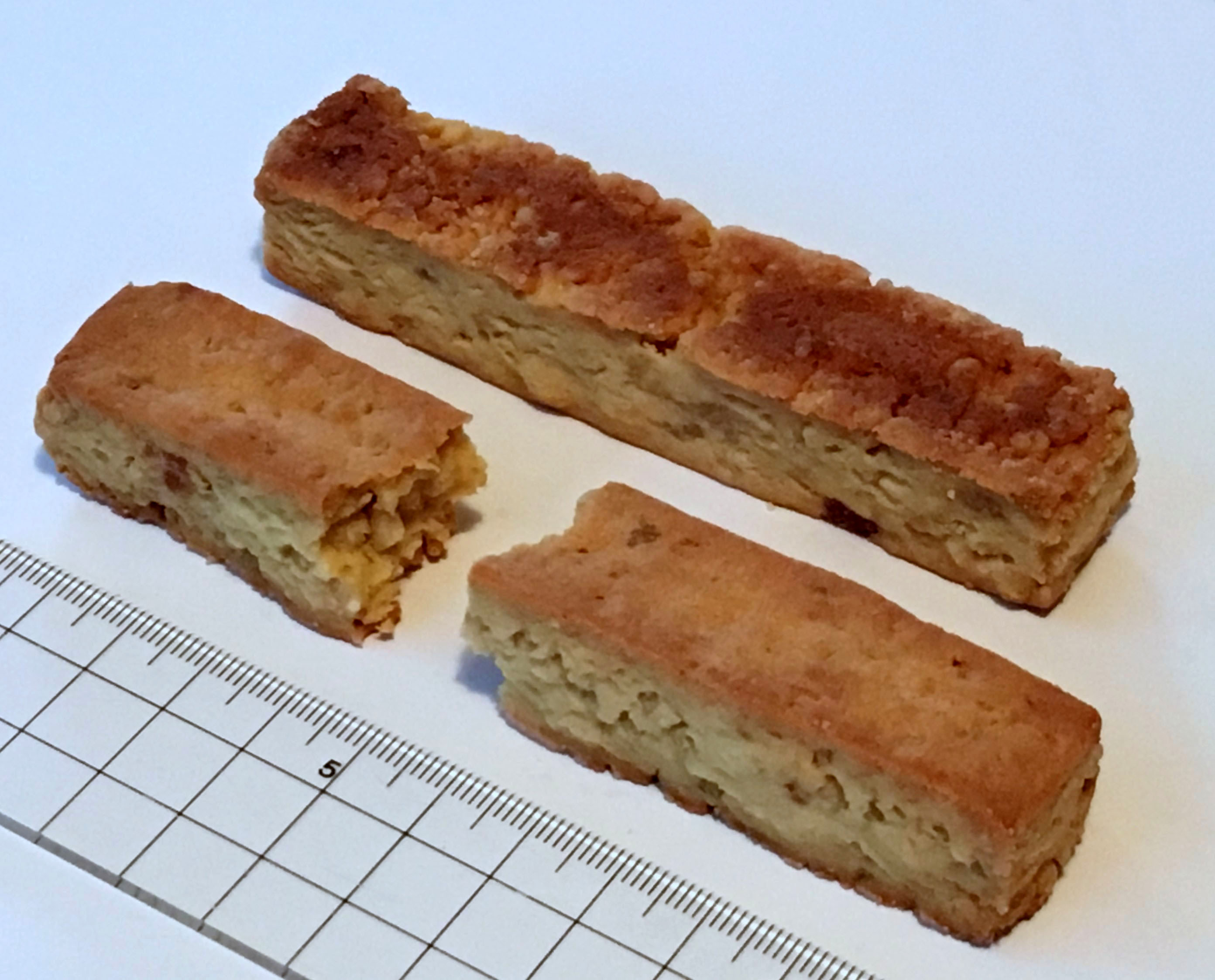 大塚製薬のソイジョイ クリスピー プレーン